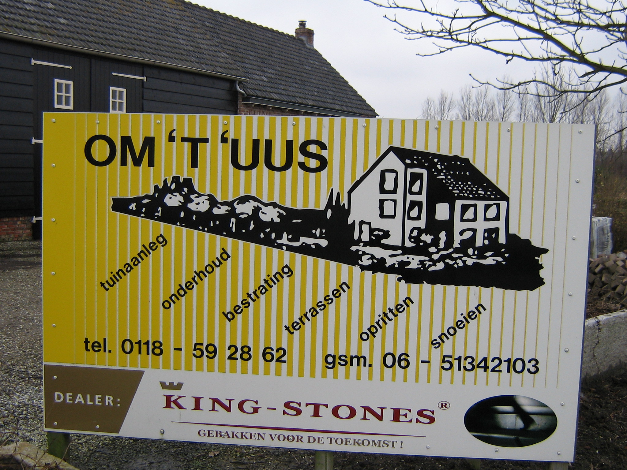 Zeeuwstalige bedrijfsnaam. Company bearing a Zeelandic name.